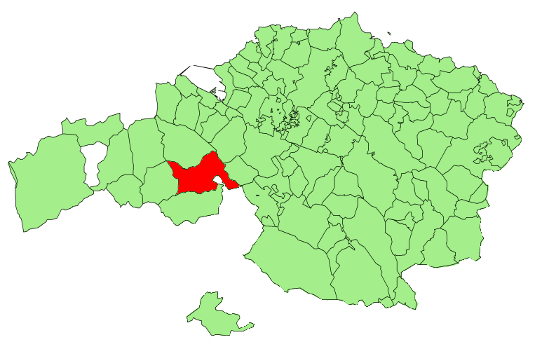 Güeñes